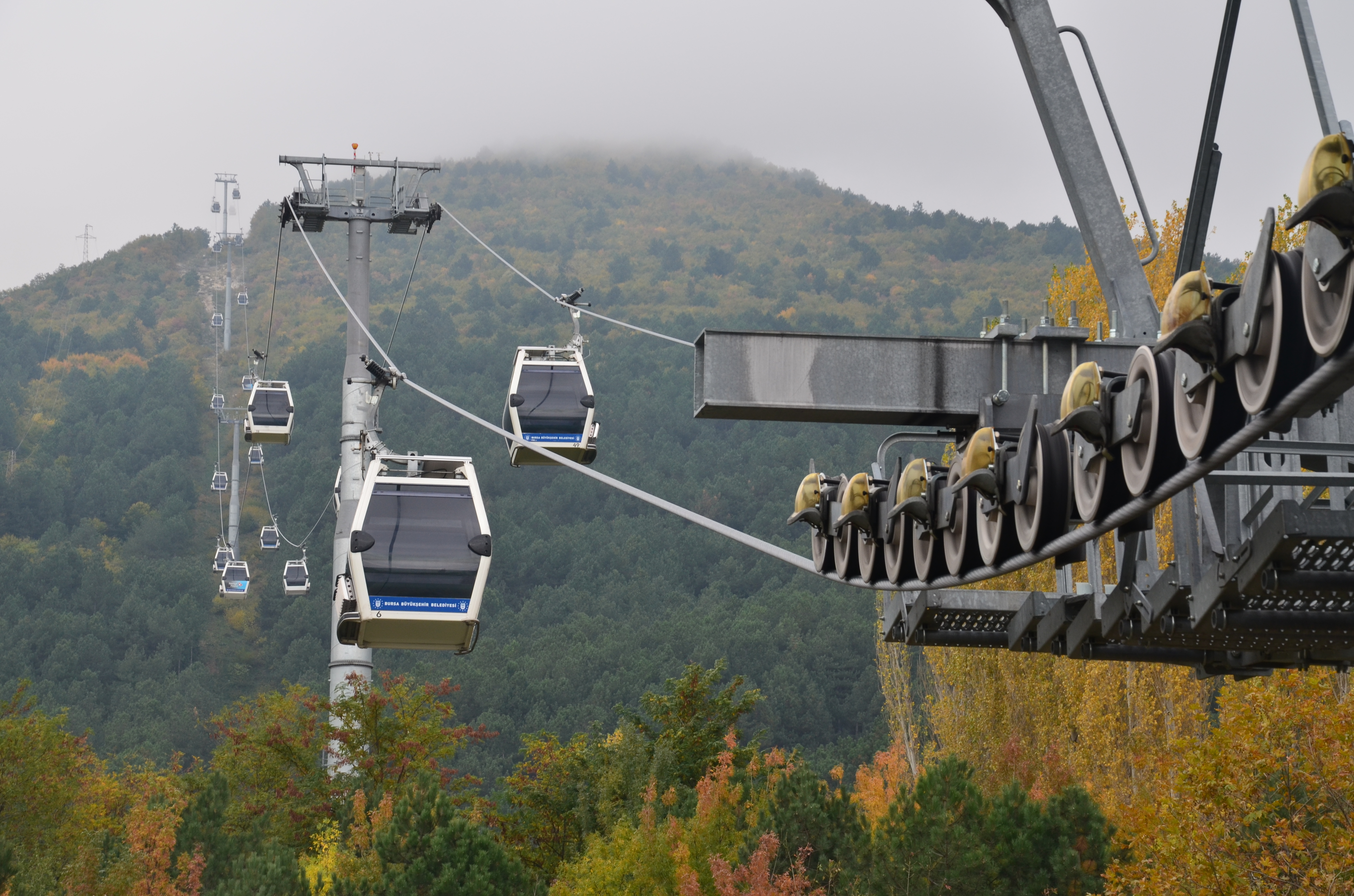 Bursa Teleferik'te Teleferikler Hattan Çıkarken